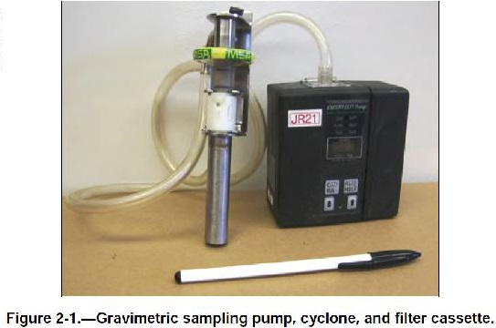 Обеспыливание при добыче угля в шахах США. Фиг. 2.1 Индивидуальный пробоотборный насос, циклон и кассета с фильтром, используемые для определения корнцентрации респирабельной пыли